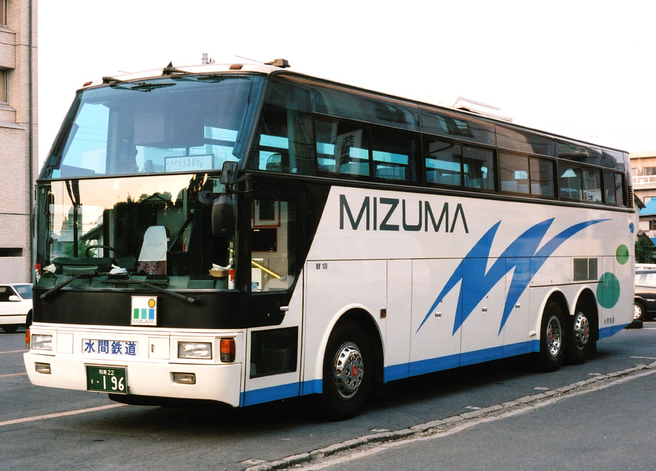 水間鉄道 U-RD620